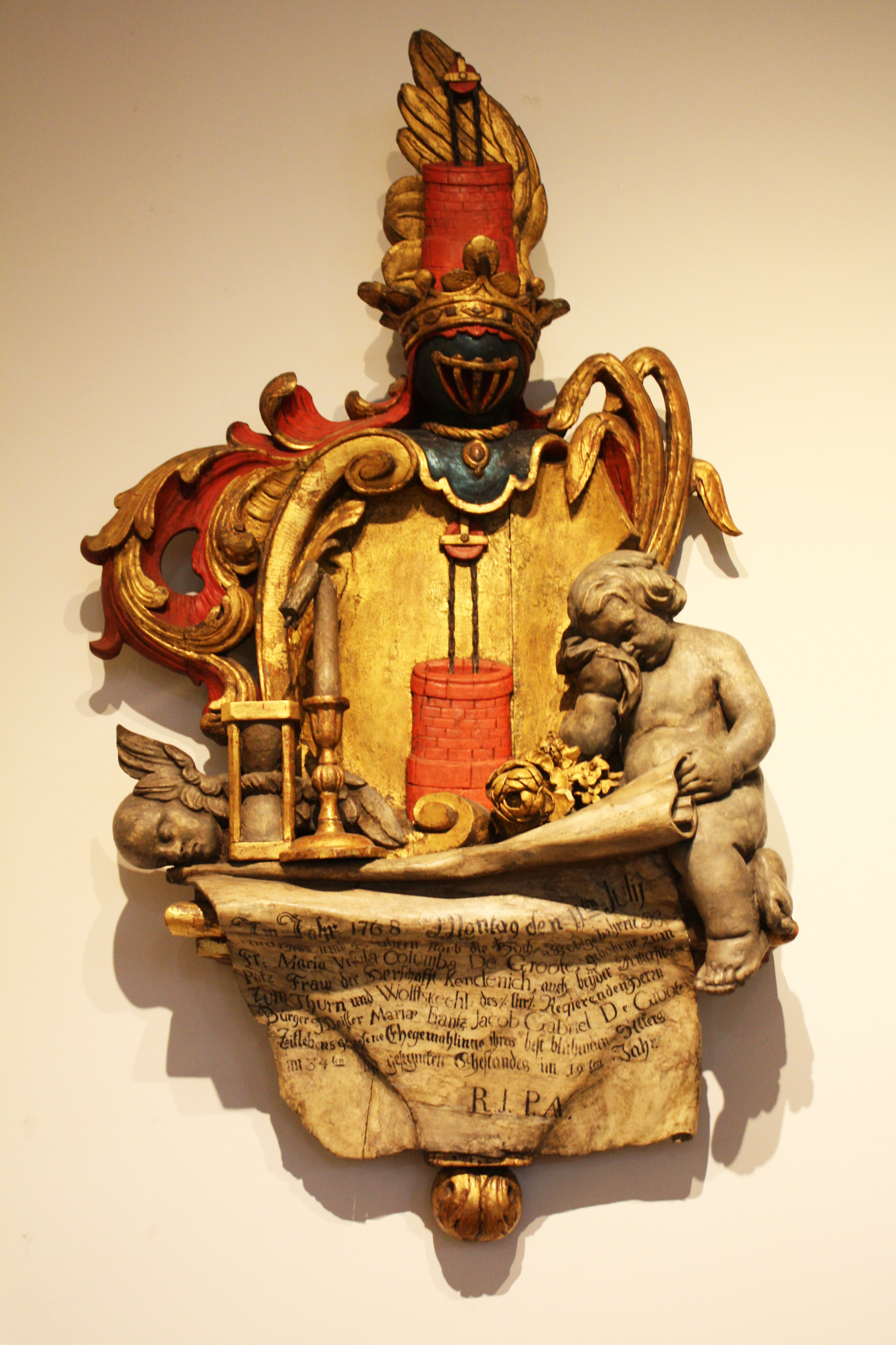 Totenschild der Maria Ursula Columba de Groote (Zeughaus Museum Köln)